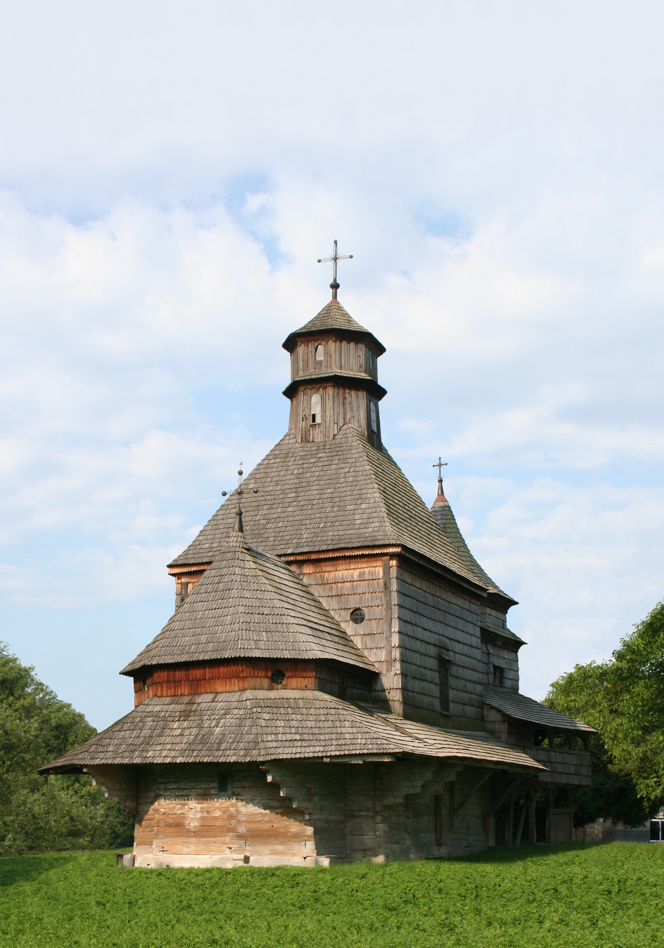 Україна Львівщина мiсто Дрогобич, Церква Чесного Хреста XVI ст. (2)